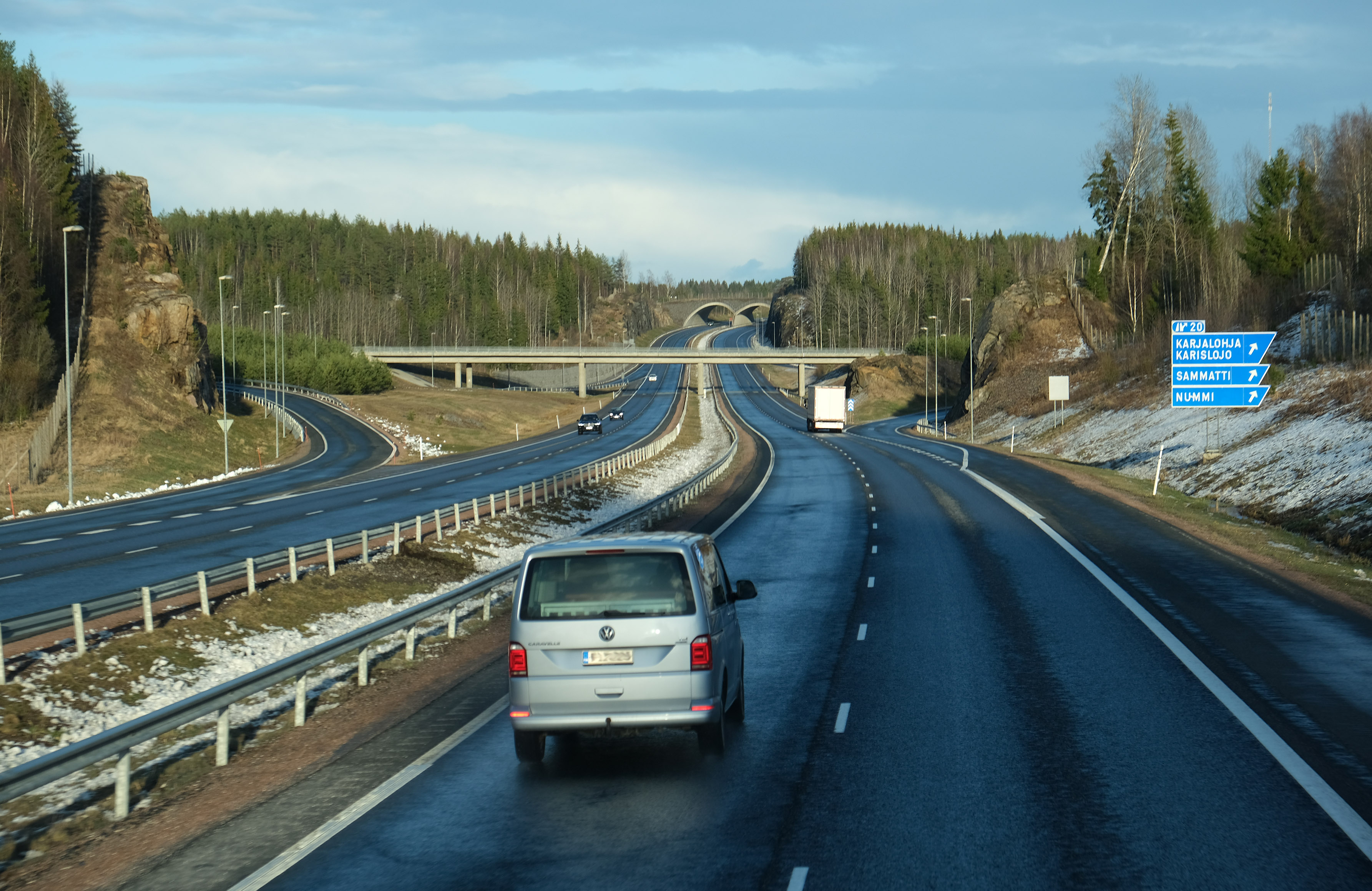 Sammatin eritasoliittymä, Valtatie 1.